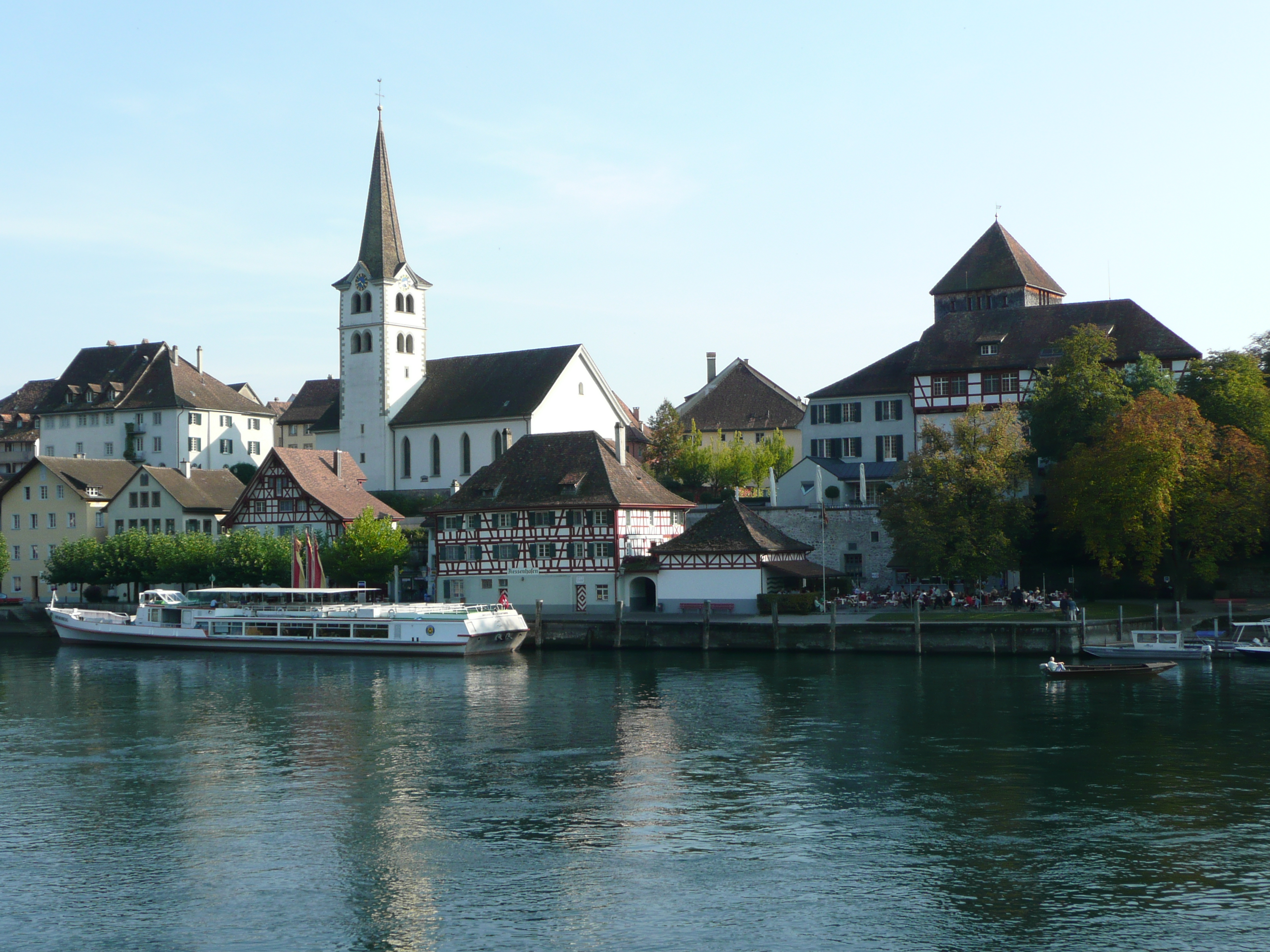 Schifflände von Diessenhofen mit Burg Unterhof (rechts) und Kirche.